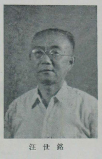 中文（台灣）: 中國人民政治協商會議第一屆全體會議代表